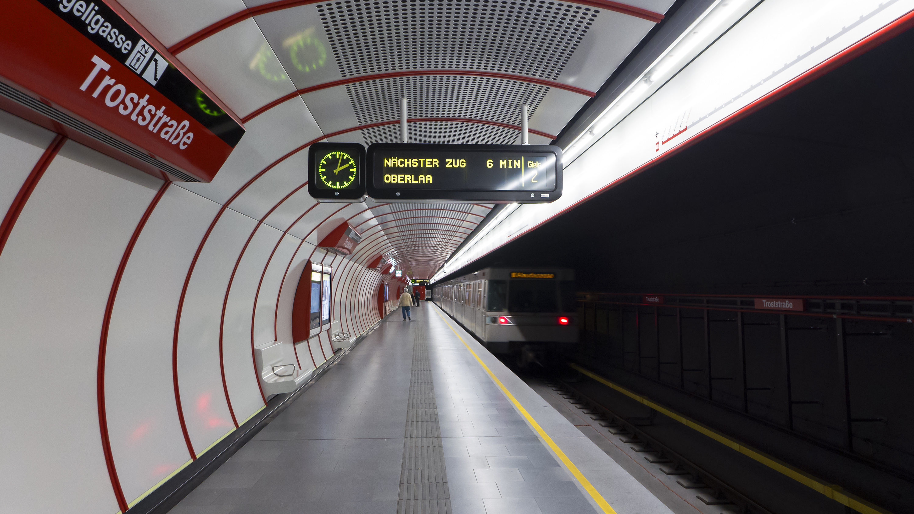 U-Bahn-Station Troststraße der Linie U1 in Wien 10, Bahnsteig Fahrtrichtung Oberlaa